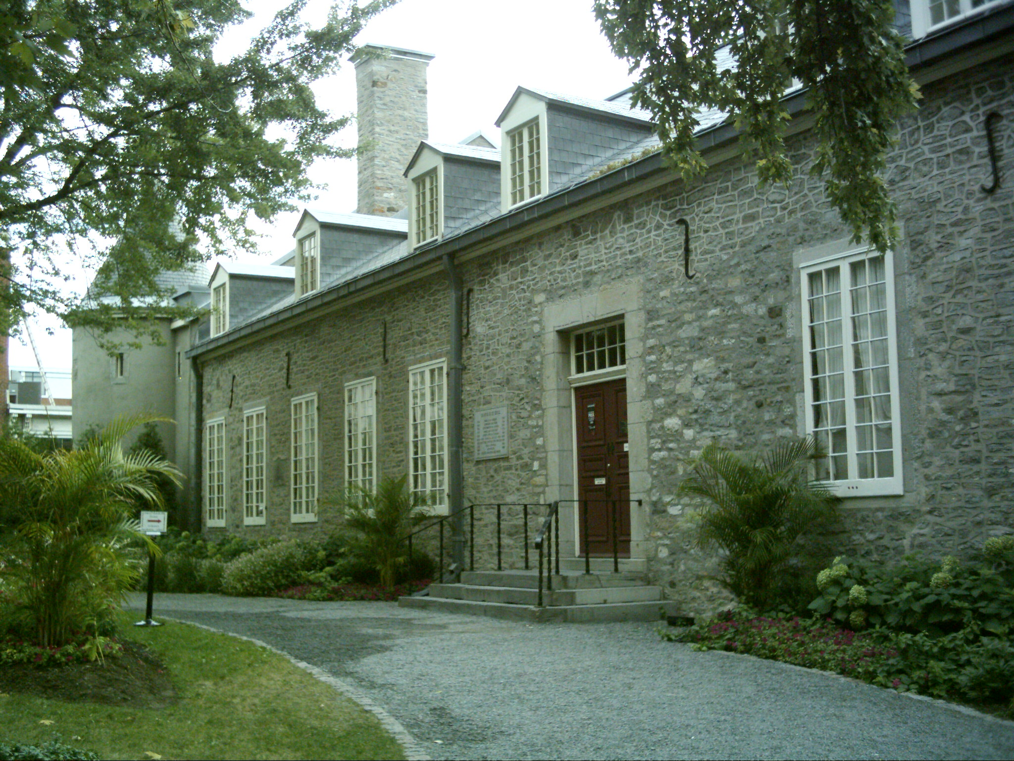 Le château Ramezay, situé rue Notre-Dame face à l'hôtel de ville dans le Vieux-Montréal